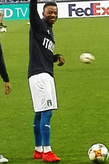 Sandro Tonali e Claud Adjapong nel riscaldamento prepartita di Belgio-Italia, gara valevole per gli europei Under-21.